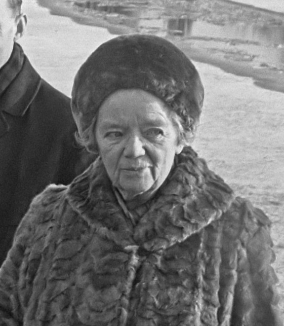 Jury voor de prijsvraag van het stadhuis van Amsterdam. V.l.n.r. architect prof. H. Schader, architect Huig Maaskant, stadsbouwmeester Chris Nielsen, J. Pedersen (stadsbouwmeester Kopenhagen), architect Frans van Gool en stedenbouwkundige mej. Jacoba (Ko) Mulder 13 januari 1968